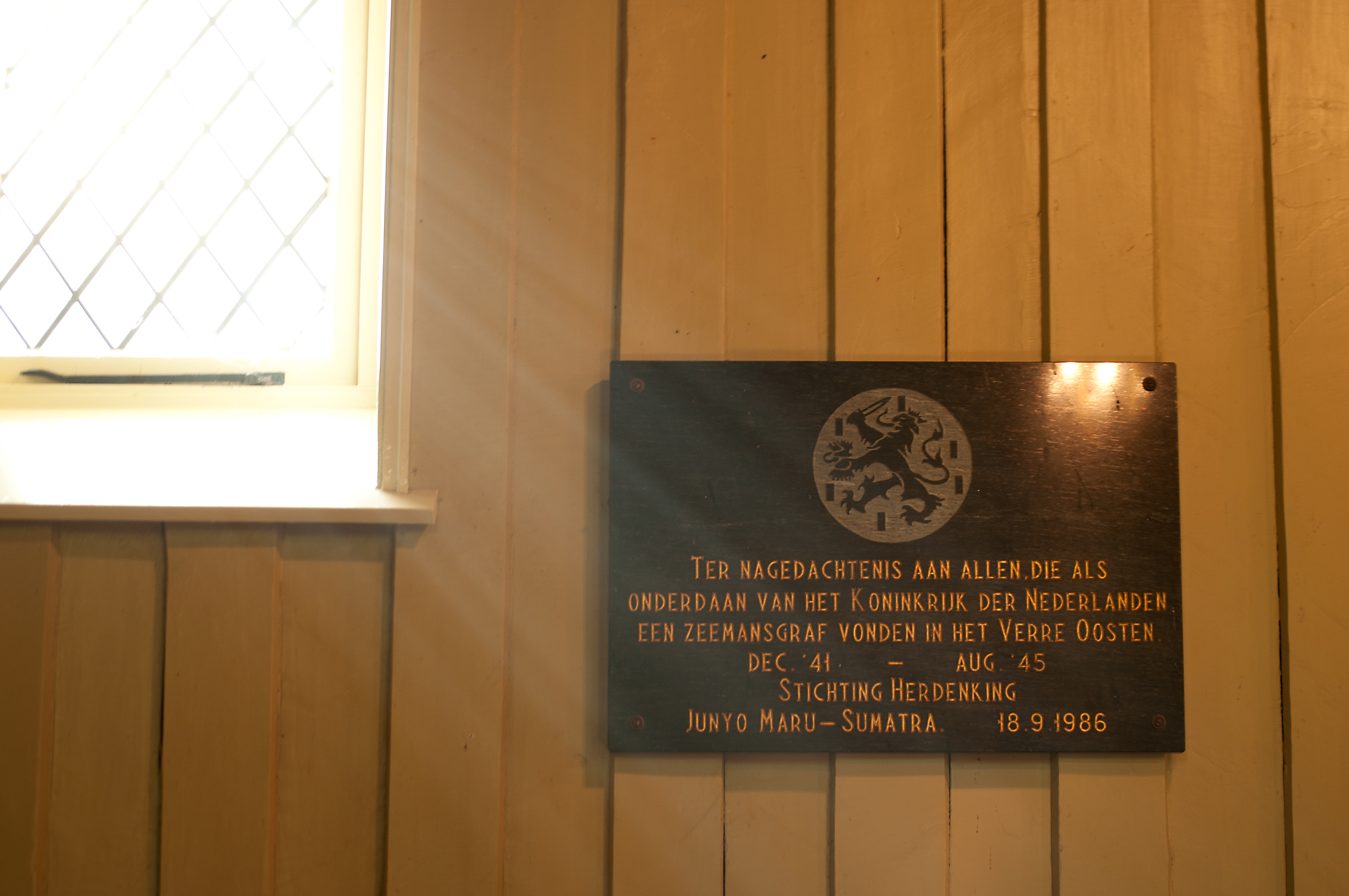 Heel soms valt het licht precies mooi op deze plaquette en dat geeft een extra dimensie aan de reden waarom deze plaquette daar hangt.